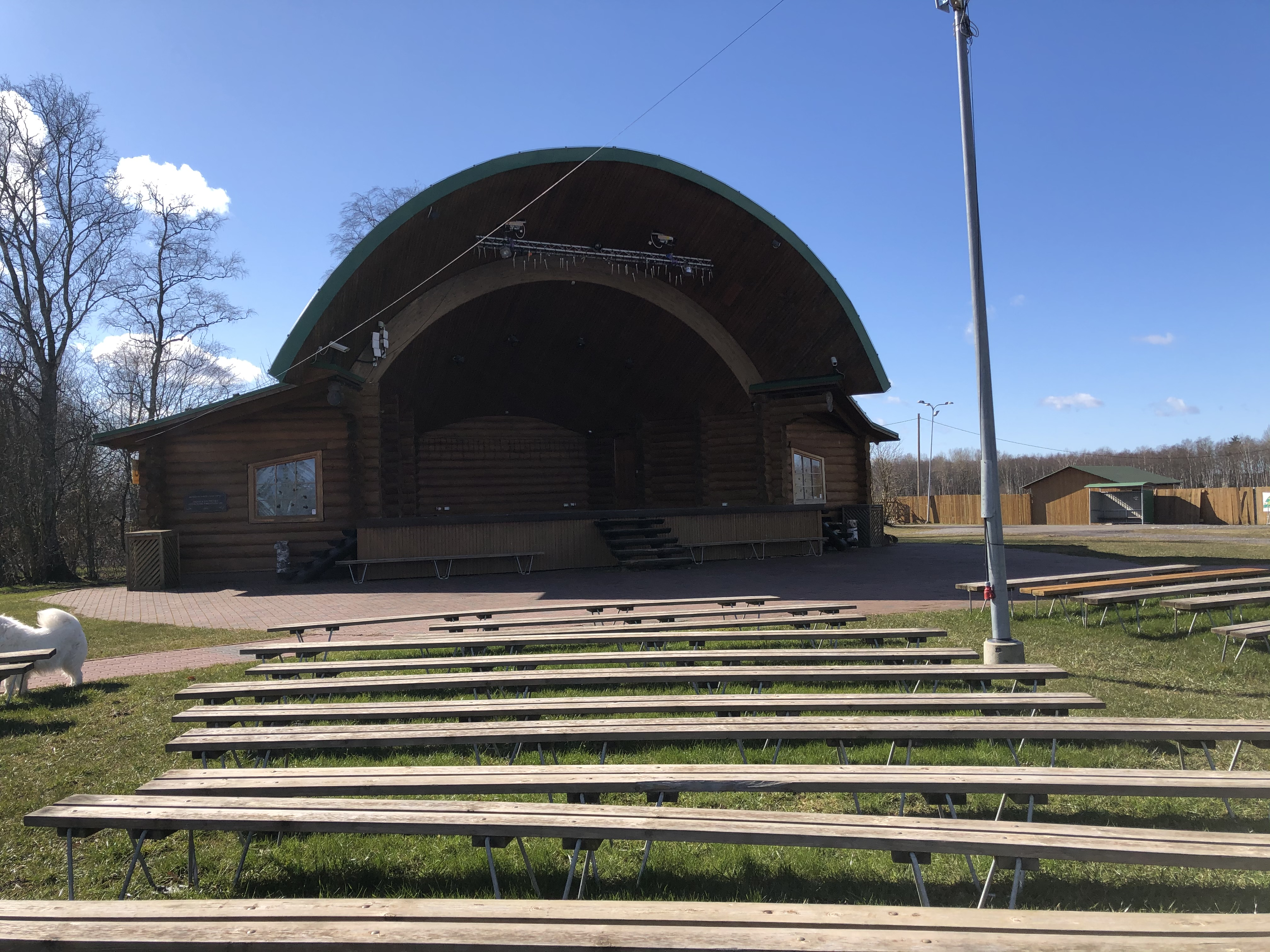 Vanamõisa vabaõhukeskuse laululava koos pinkidega